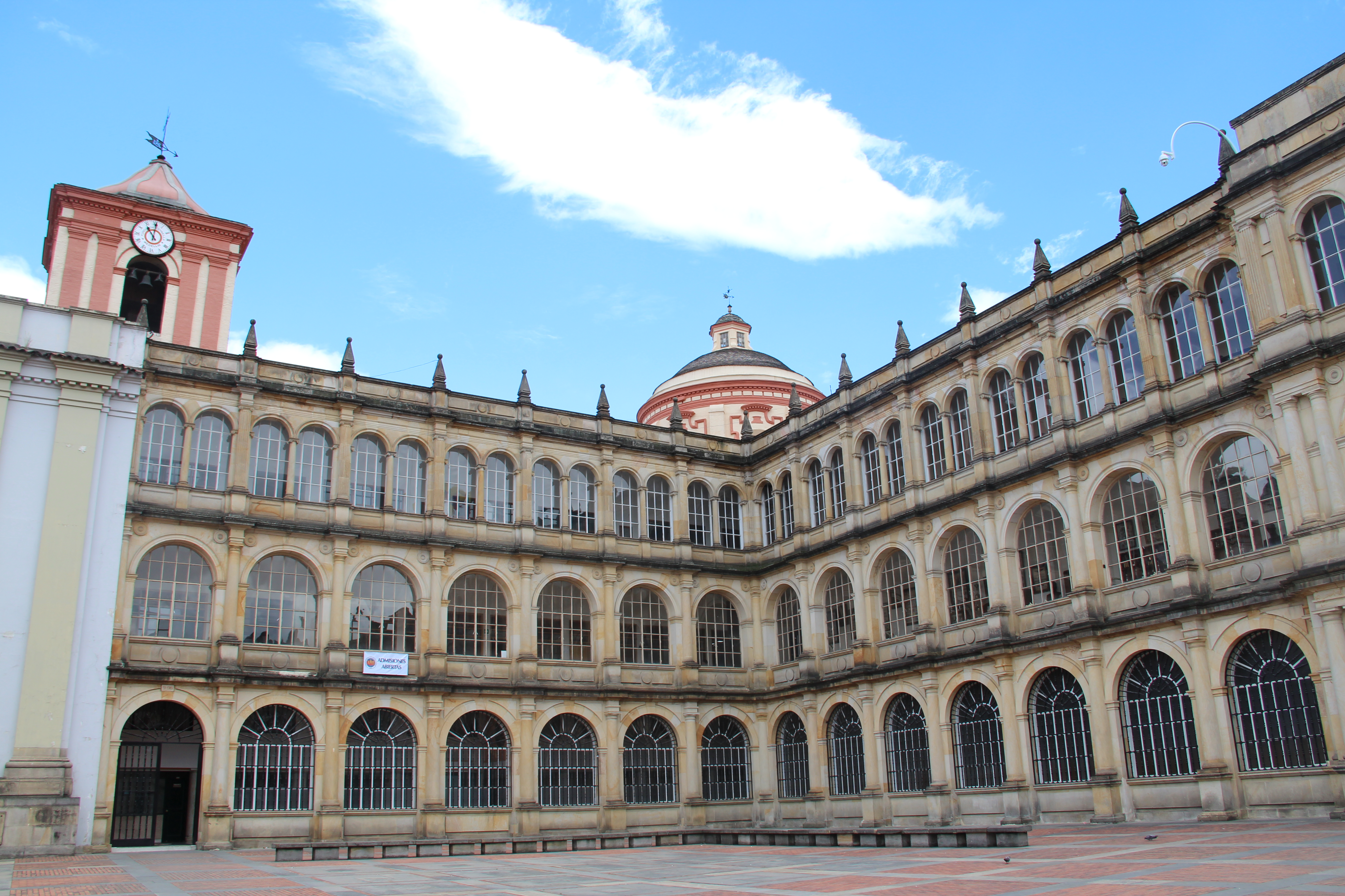 Plazoleta Camilo Torres acceso principal del Colegio Mayor de San Bartolomé